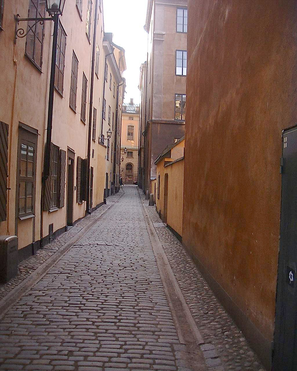 Trädgårdsgatan, Gamla stan, Stockholm. Light modified.